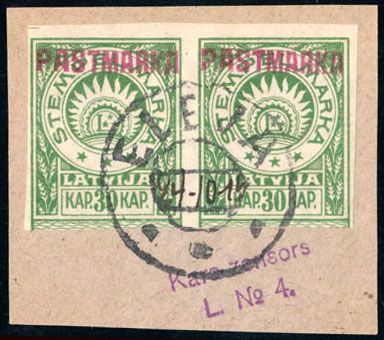 Провизорий Элеи (Латвия) на вырезке